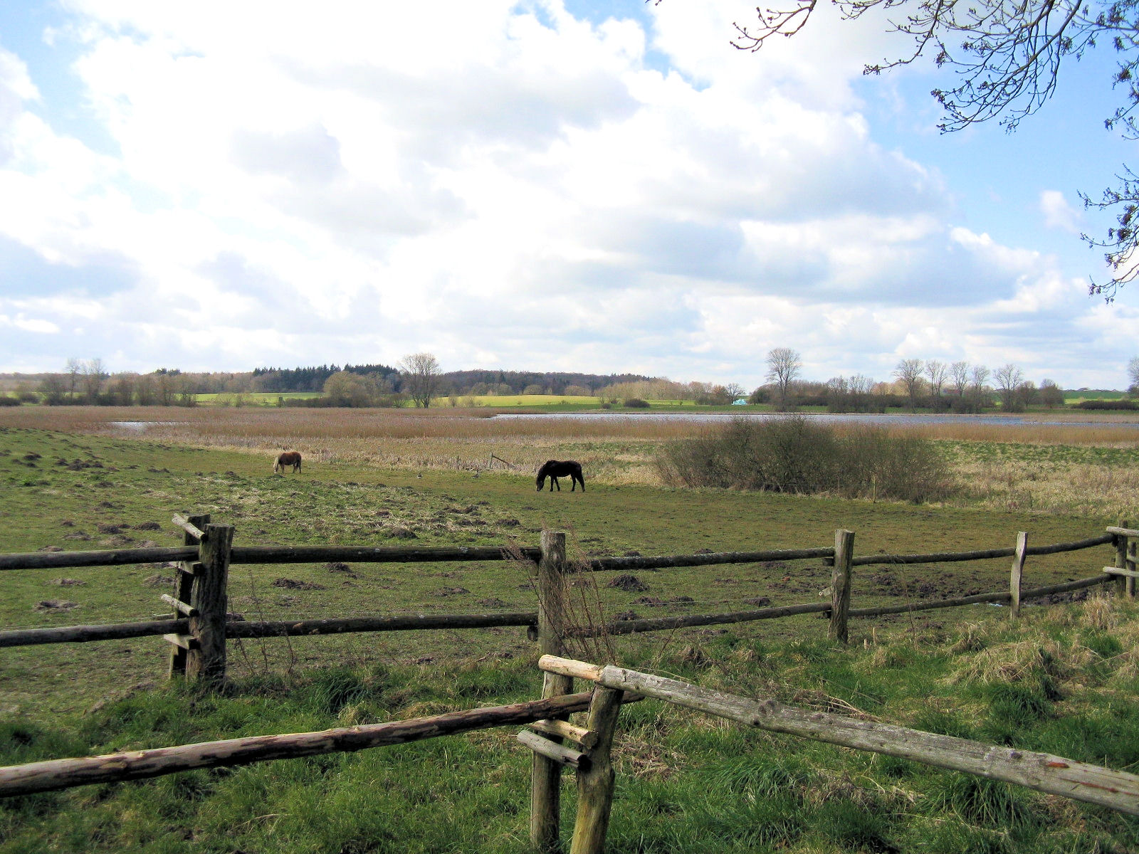 Langenhägener Seewiesen, Kranichrastplatz, IGA 2003- und BUGA 2009-Außenstandort im Landkreis Parchim, Mecklenburg-Vorpommern